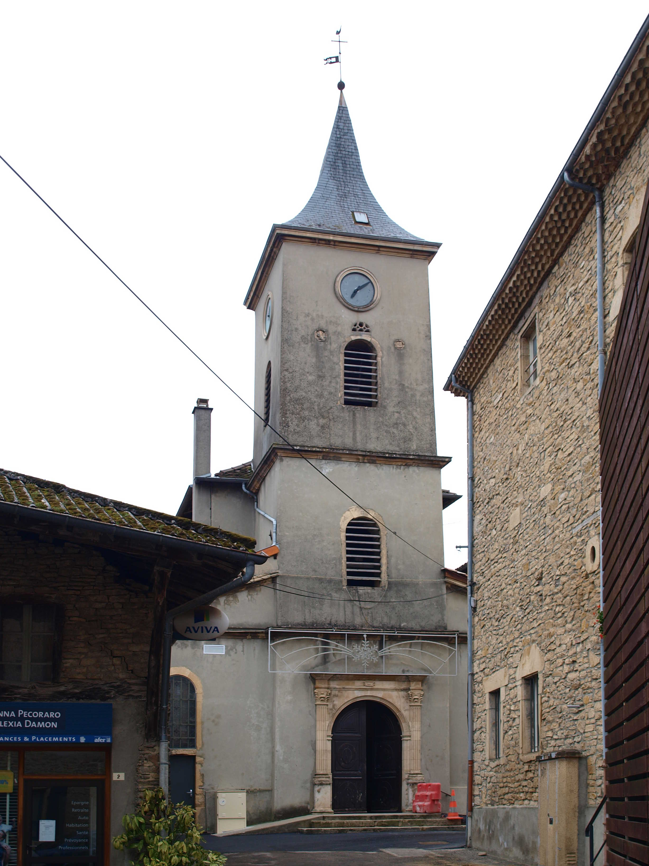 Saint-Alban-de-Roche (Isère, France) ; église